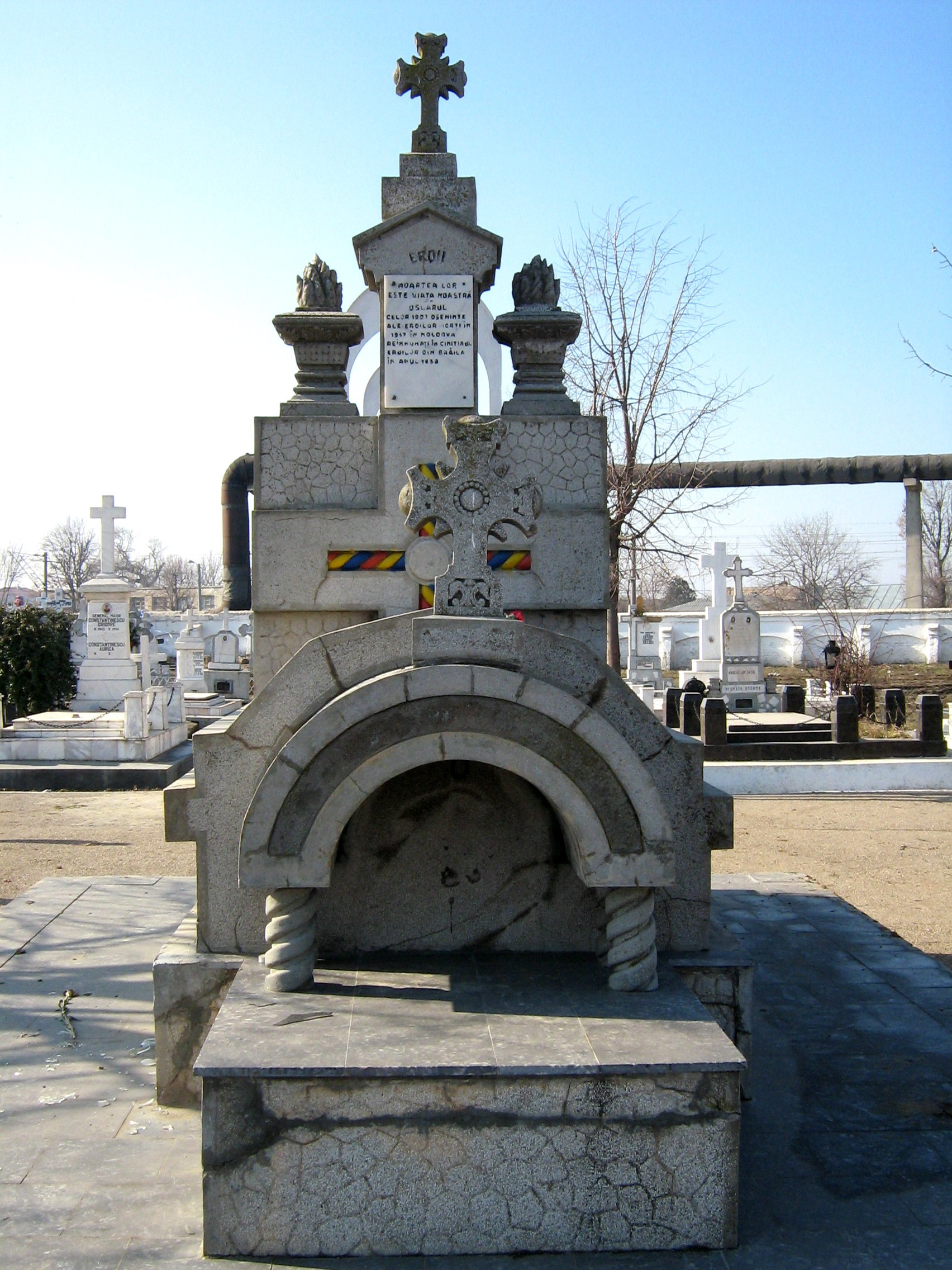 Osuarul românilor căzuți în Moldova în 1917